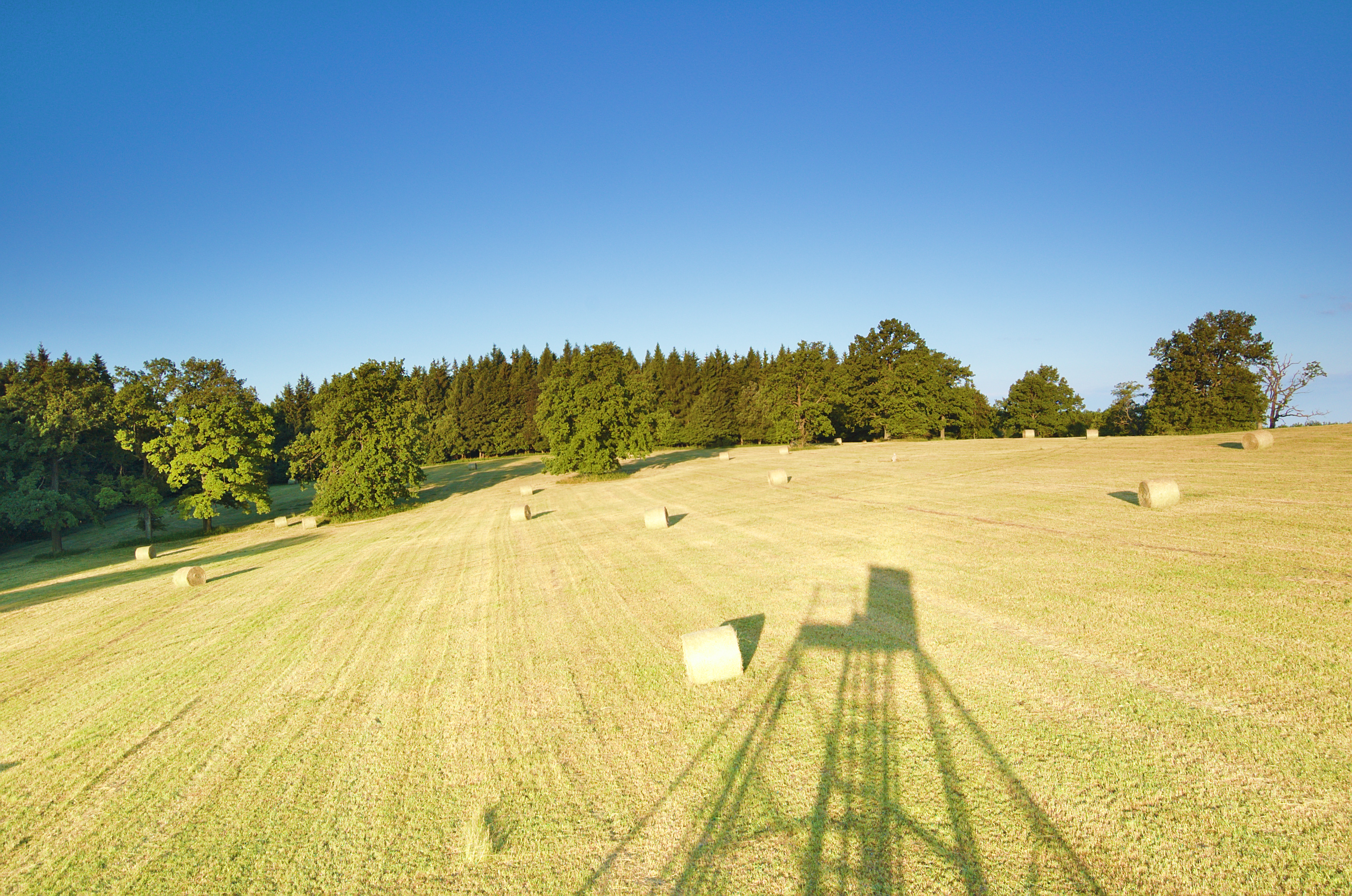 Kopec Lesná, okres Uherské Hradiště